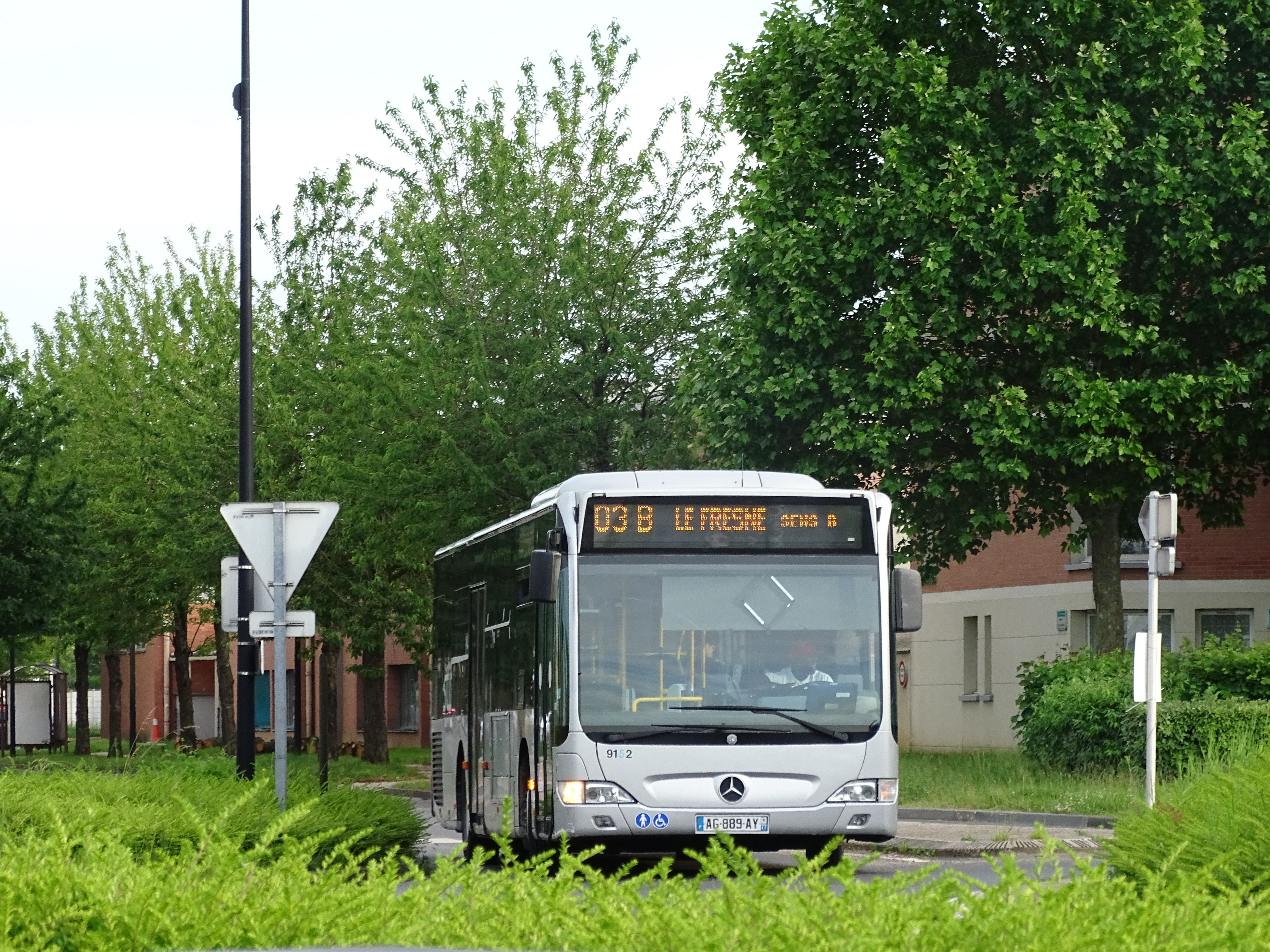 Un Citaro Facelift sur la 03B au Fresne, à Saint-Pierre-du-Perray.